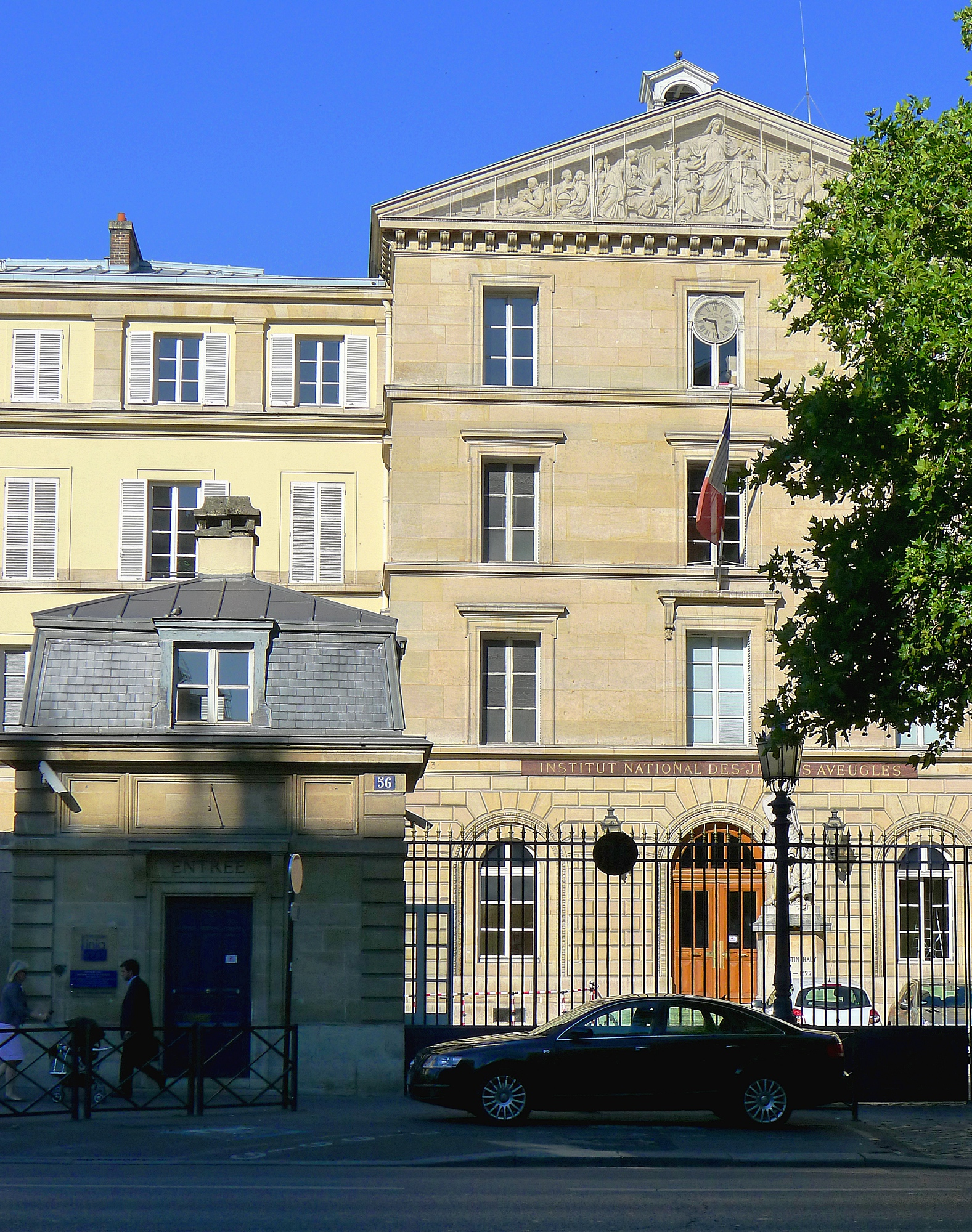 Institut national des jeunes aveugles au n°56 du boulevard des Invalides - Paris VII .